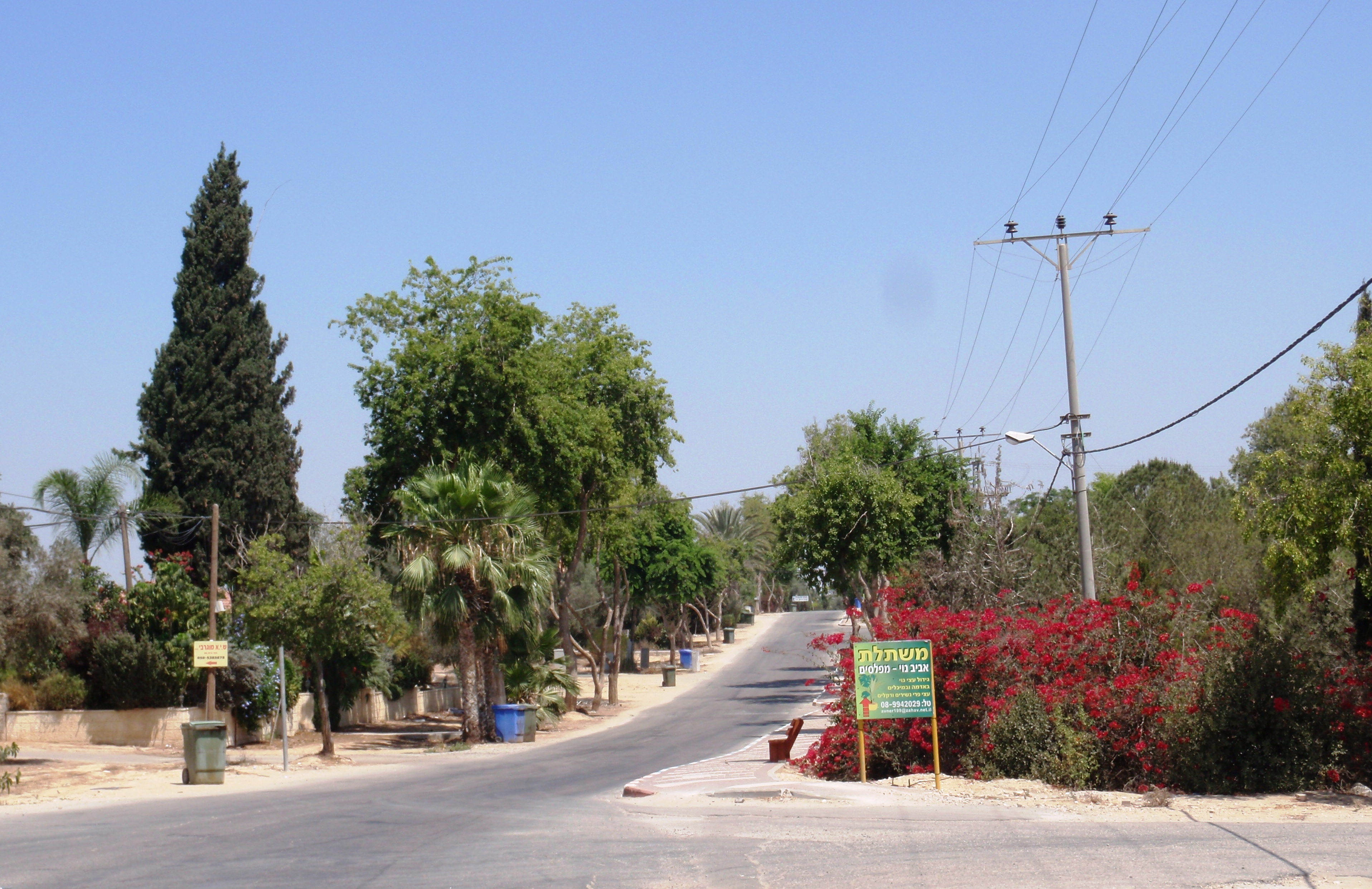 Moshavim בית הגדי רחוב במושב